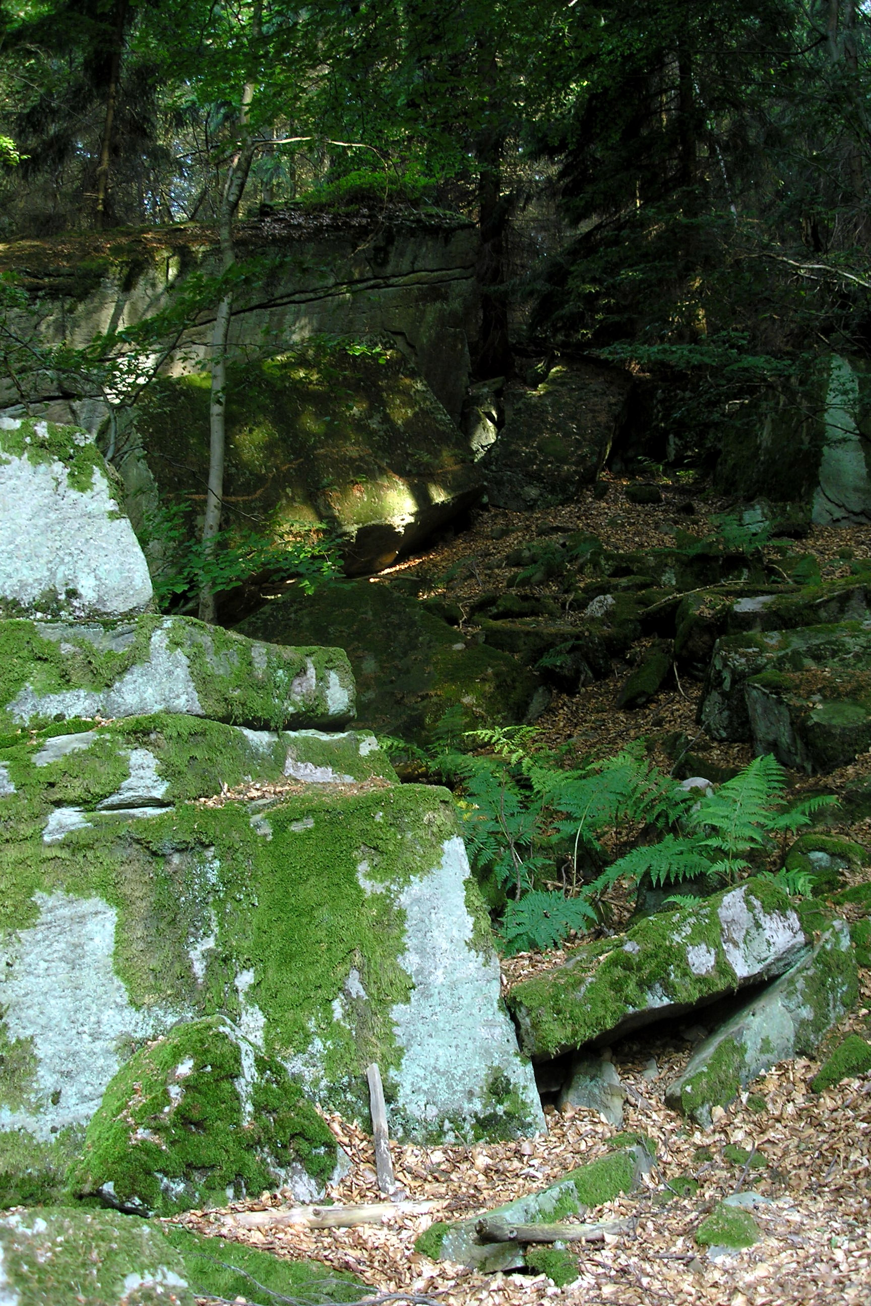 Geeotop Felsgruppe Große Steine im Landkreis Bad Kissingen